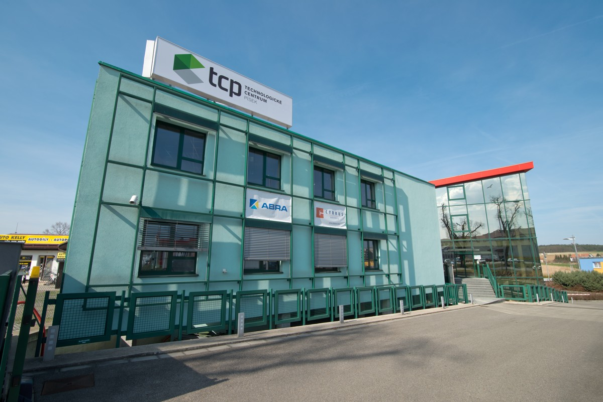 TCP zelená budova